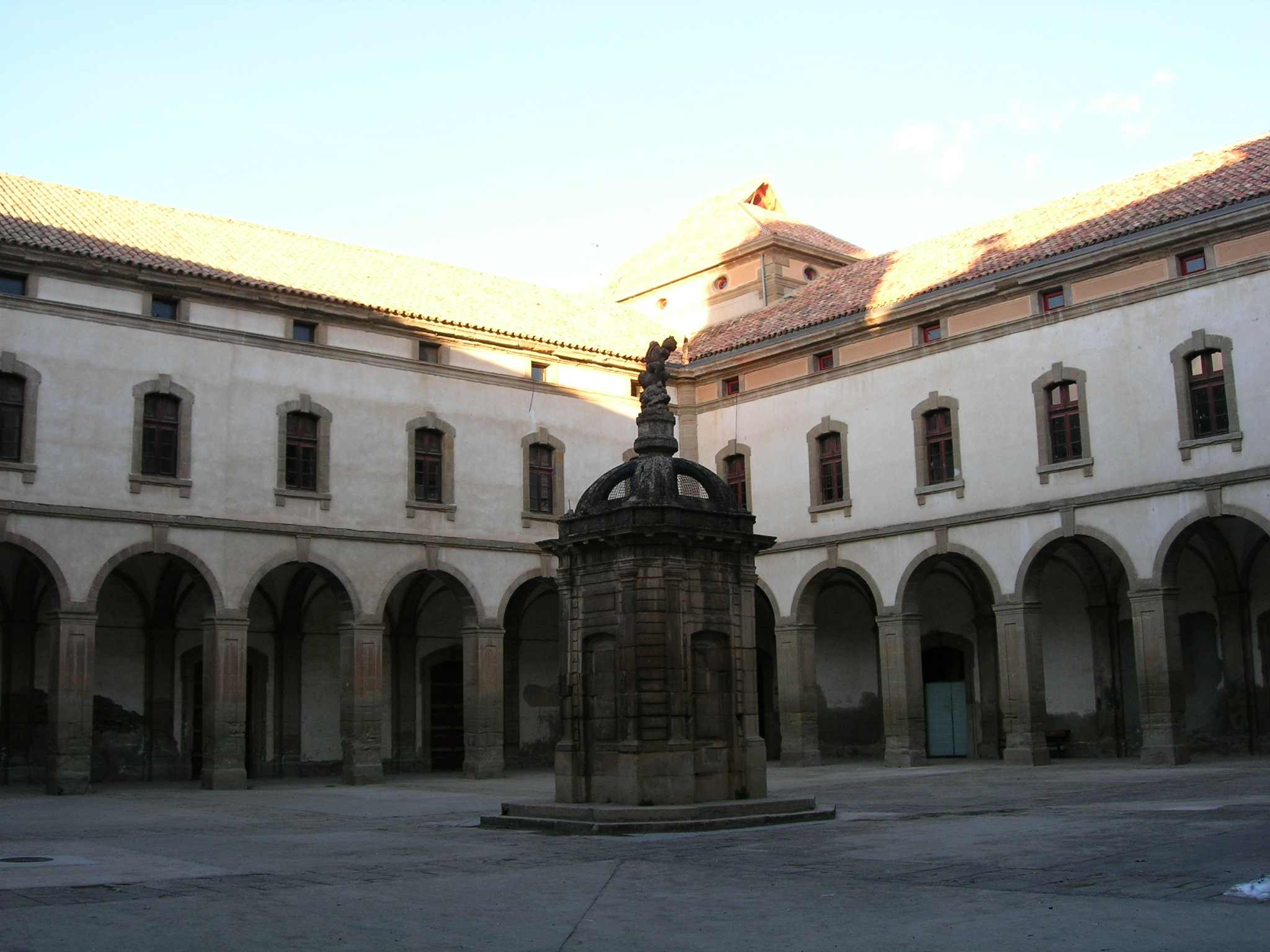 Edifici de la Universitat (Cervera)